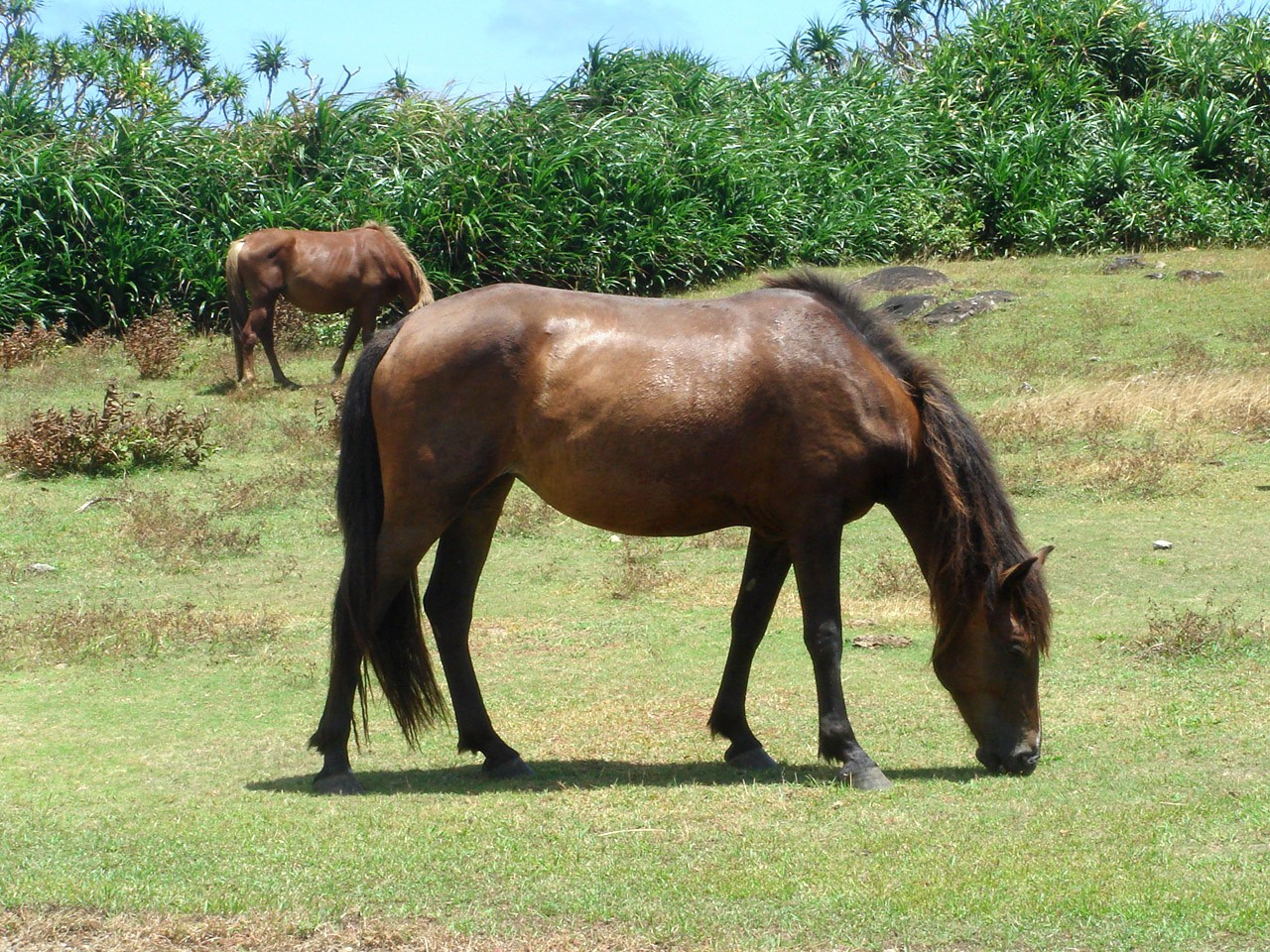 Yonaguni-uma, Yonaguni Island, Okinawa Pref., Japan / 与那国馬（沖縄県与那国島）